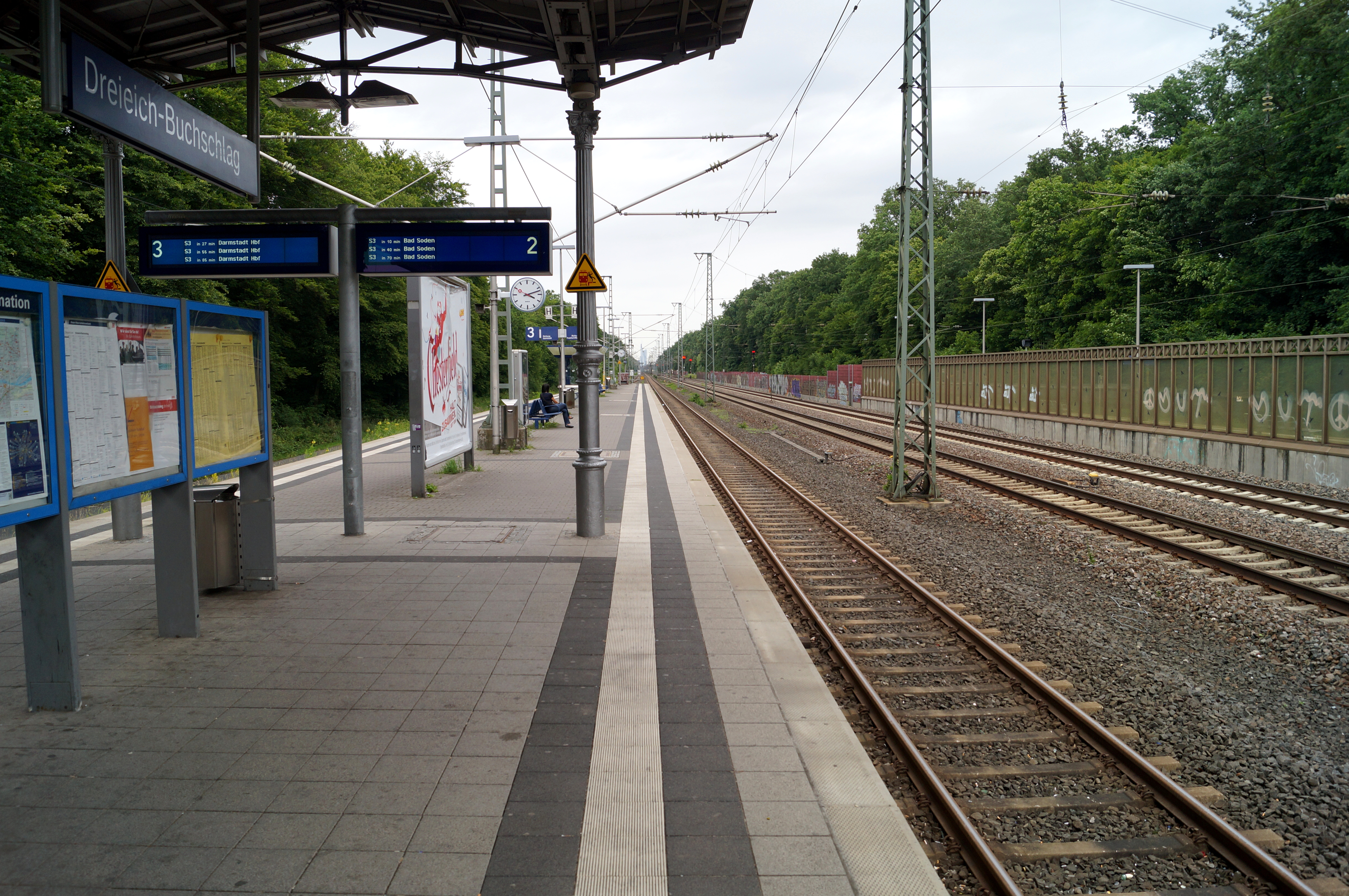 Die Bahnsteige für den S-Bahn-Verkehr des Bahnhofs Dreieich-Buchschlag